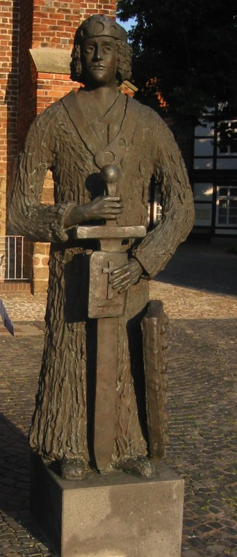 Heiligenlexikon.de Bild wurde freundlicherweise vom ÖHL "gemeinfrei gestellt" [1]